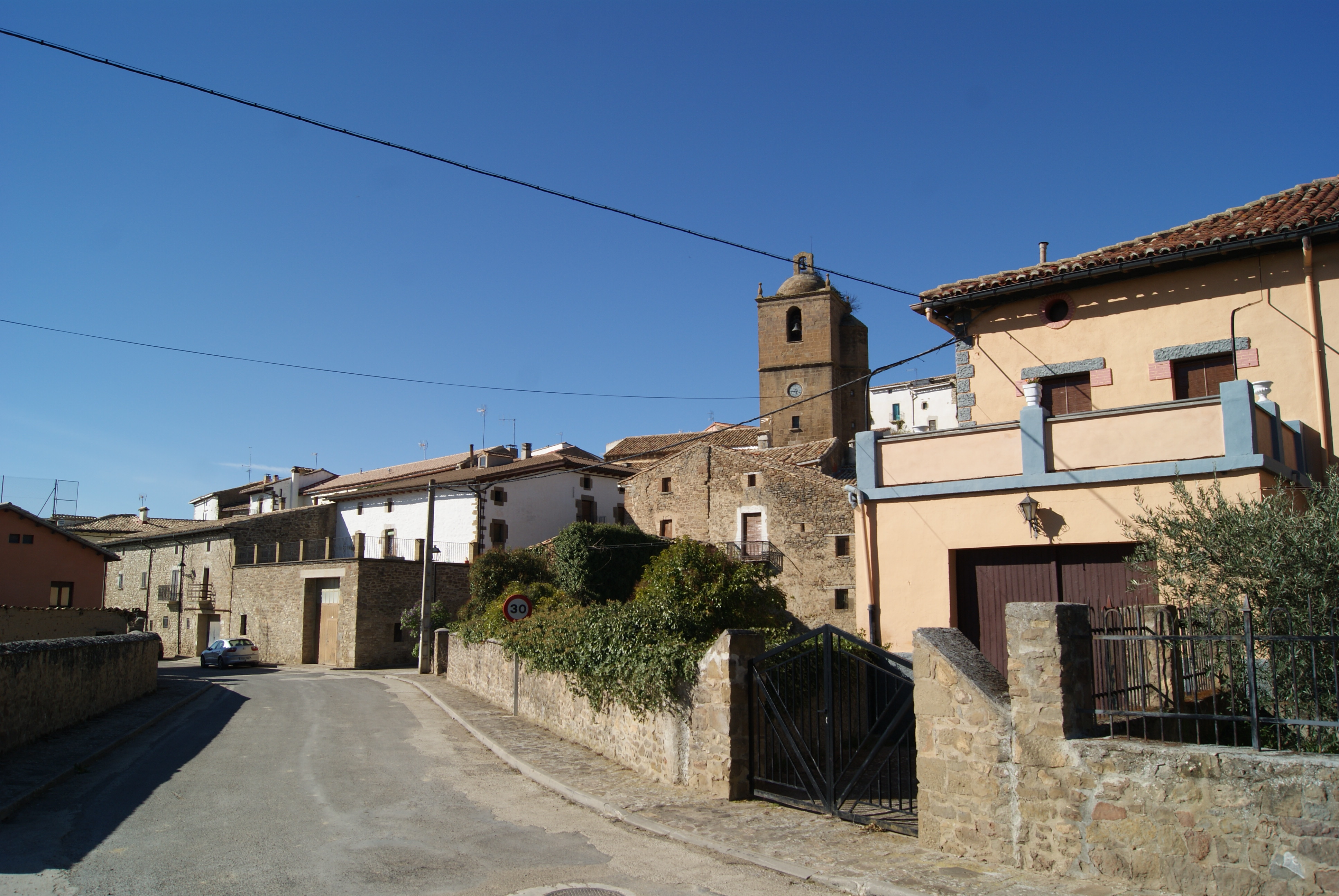 Urriés (Zaragoza)